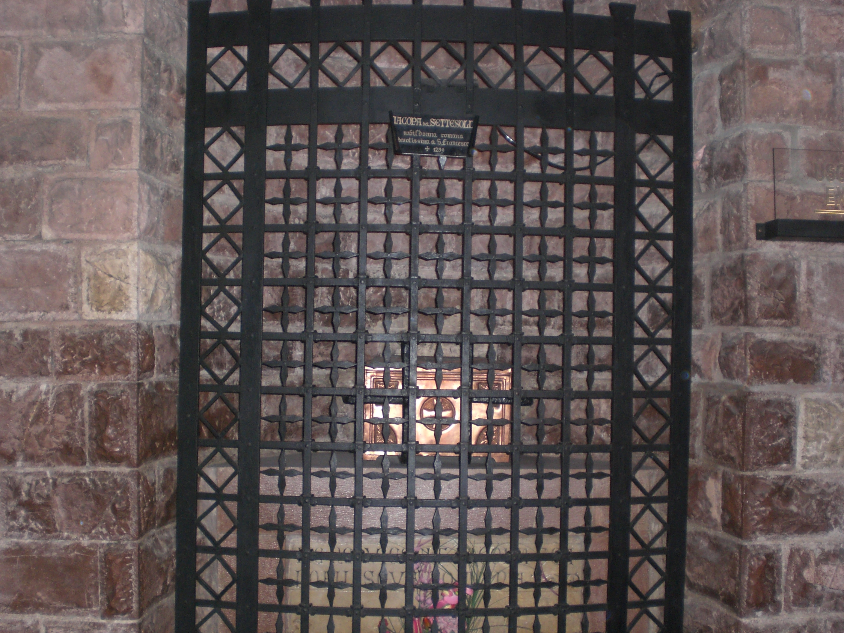 Foto personale della tomba di Iacopa dei Settesoli